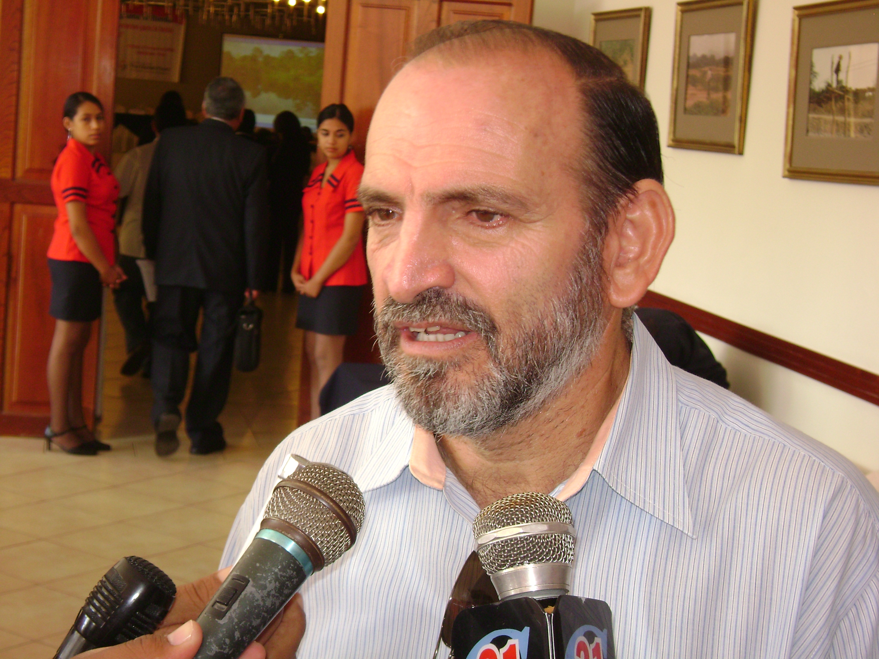 Yehude Simon Munaro brindando declaraciones al final de la presentación macrorregional de la Sexta Ronda del Fondo Global. Ciudad de Chiclayo, Perú, 21 de mayo de 2008.